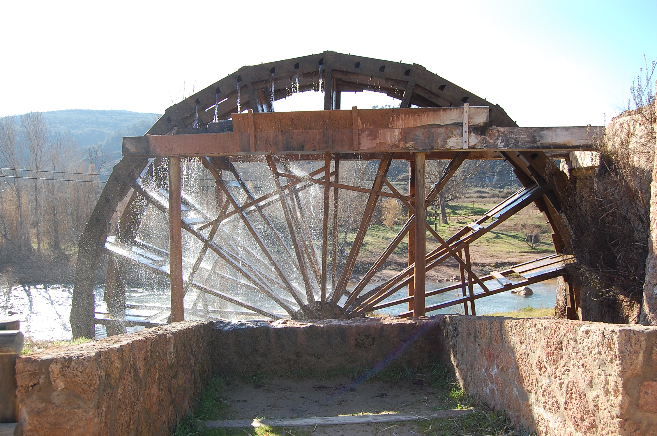 Noria de Casas del rio